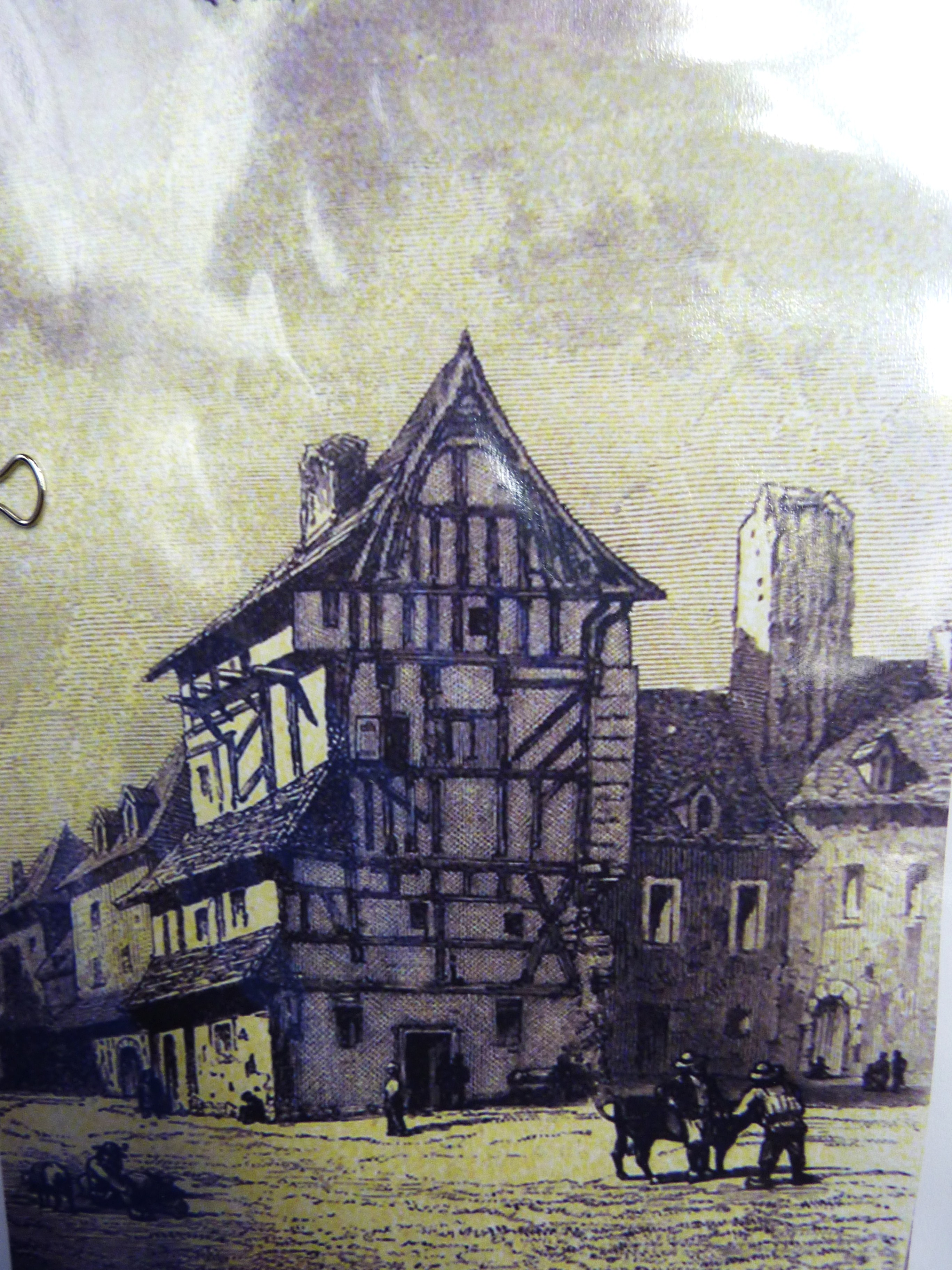 Gravure ancienne représentant de vieilles maisons de Quimperlé